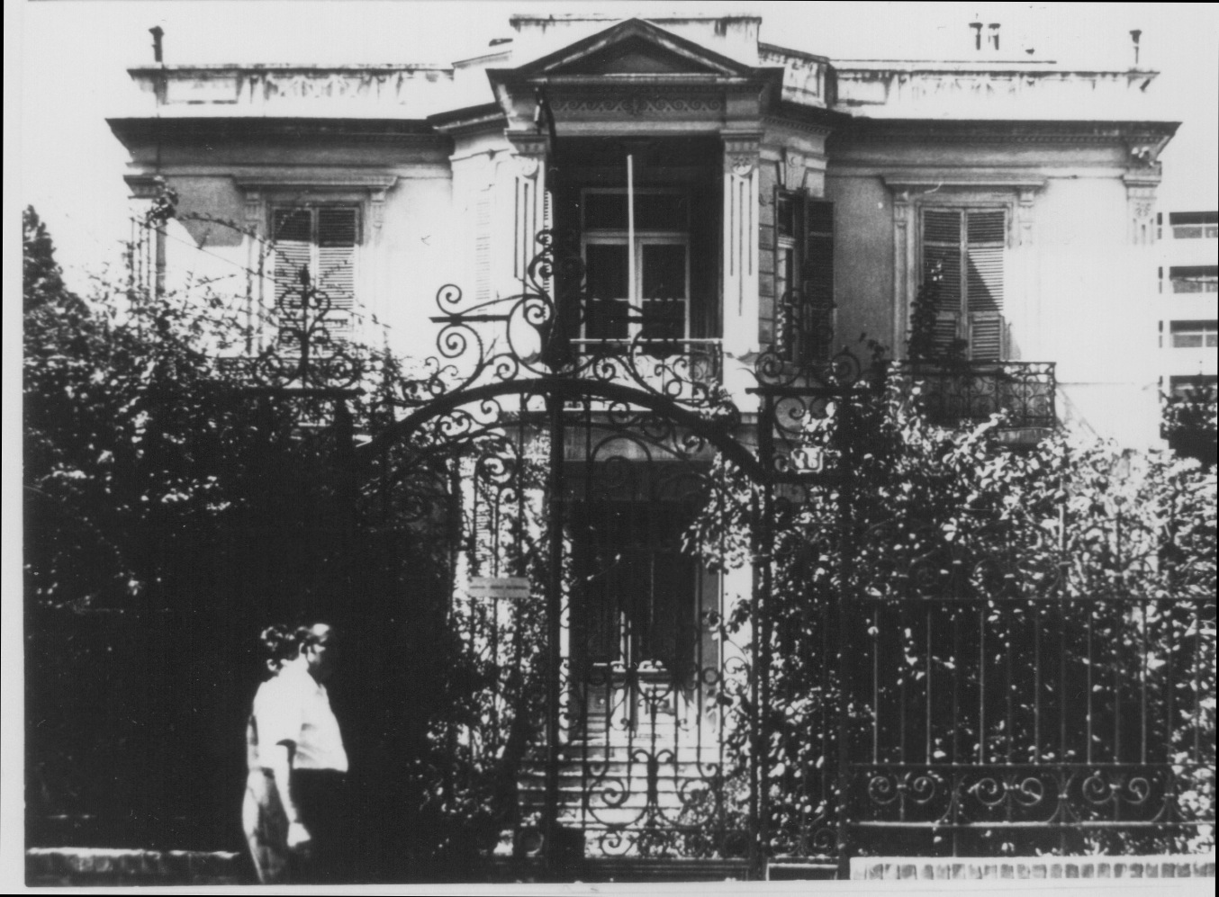 Έπαυλις καθηγητού Καρόλου Αλεξανδρίδη επί της Βασιλέως Γεωργίου Α΄